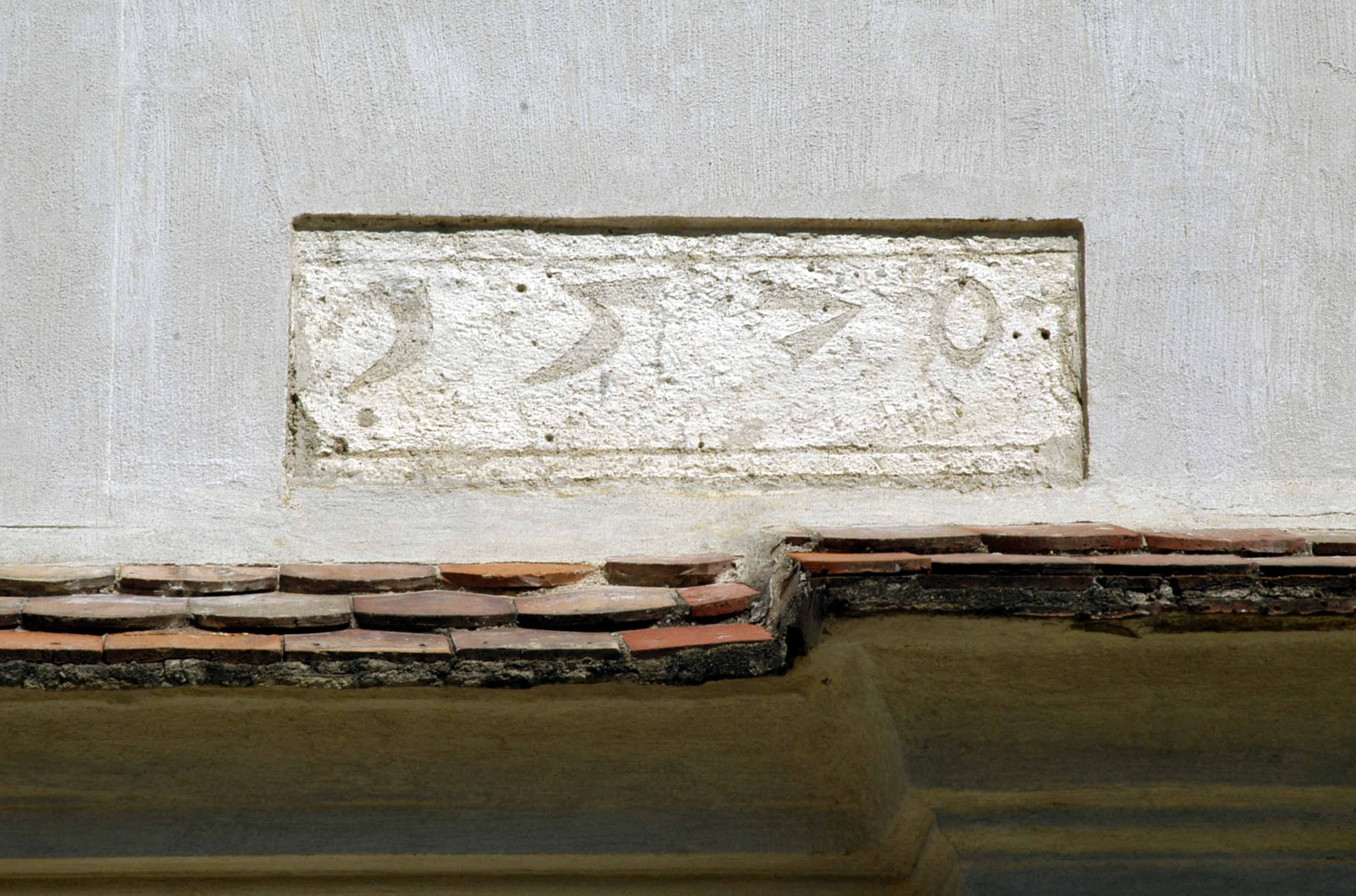 Schloss Limberg / Fassadendetail